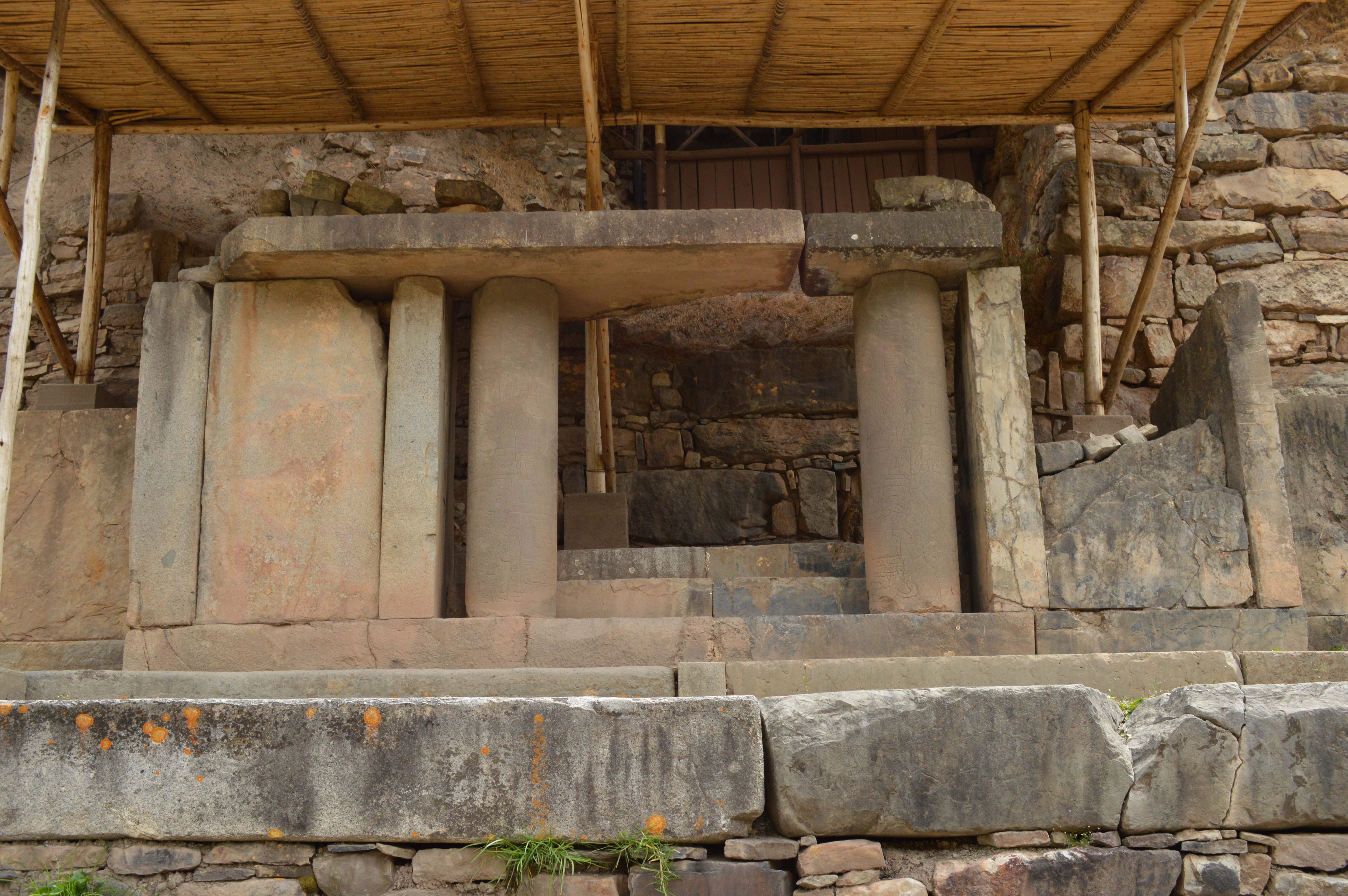 Portada de las Falcónidas en el centro ceremonial Chavín de Huántar, Áncash, Perú.